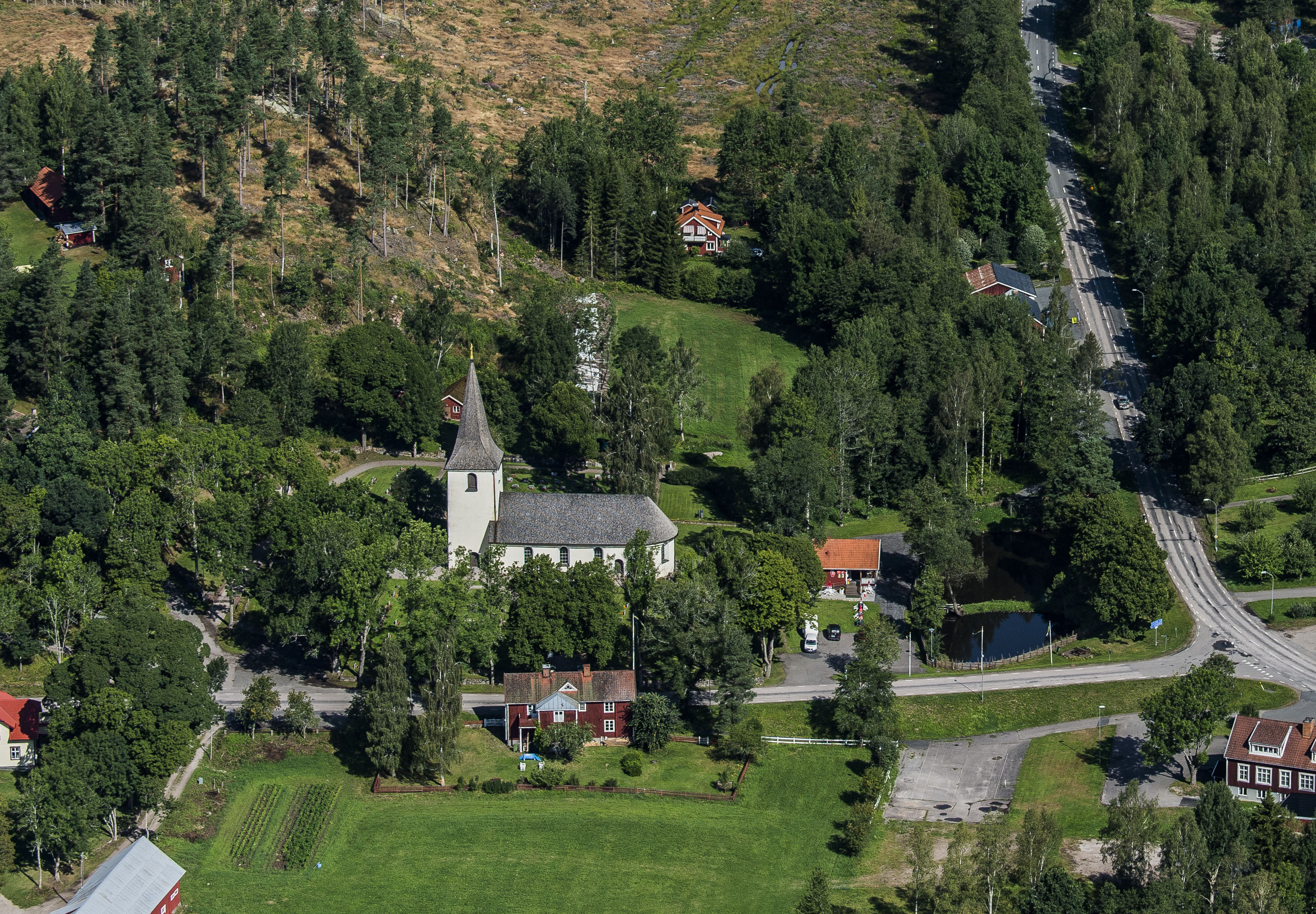 Nye ka